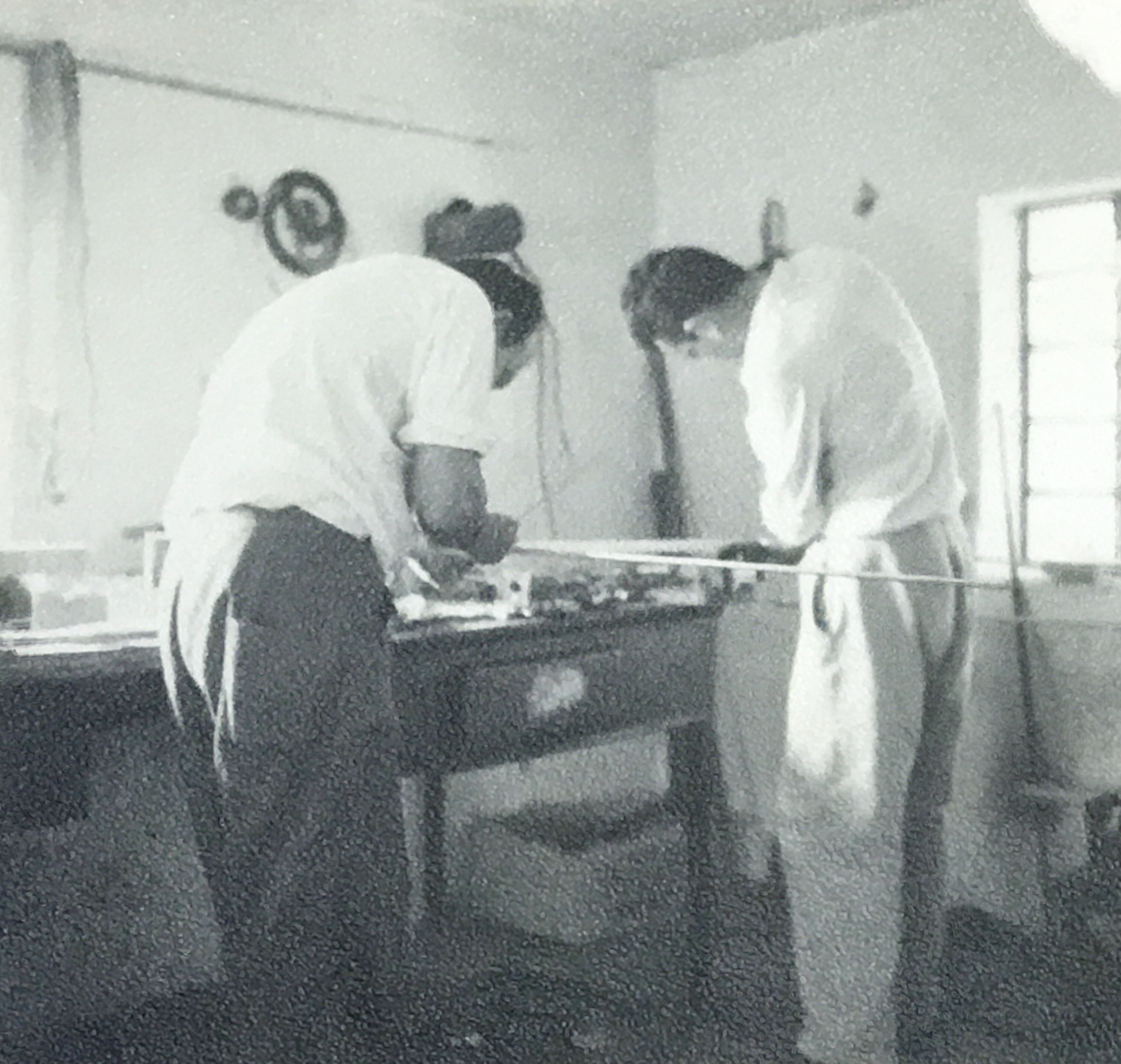 Carlos e Artur Faria trabalhando com um retransmissor